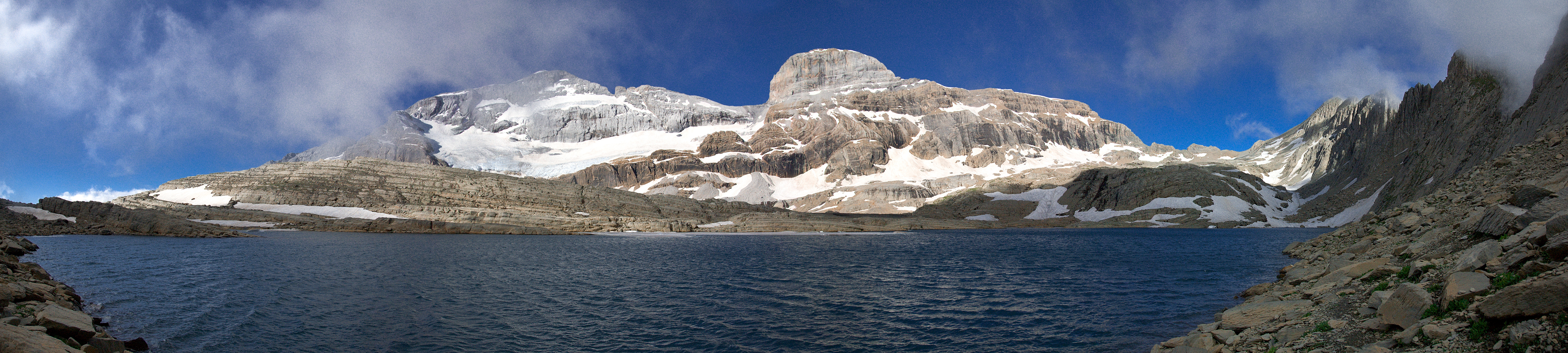 le lac du Marboré (2592 m) avec le mont Perdu au fond à gauche et le cylindre du Marboré au milieu.